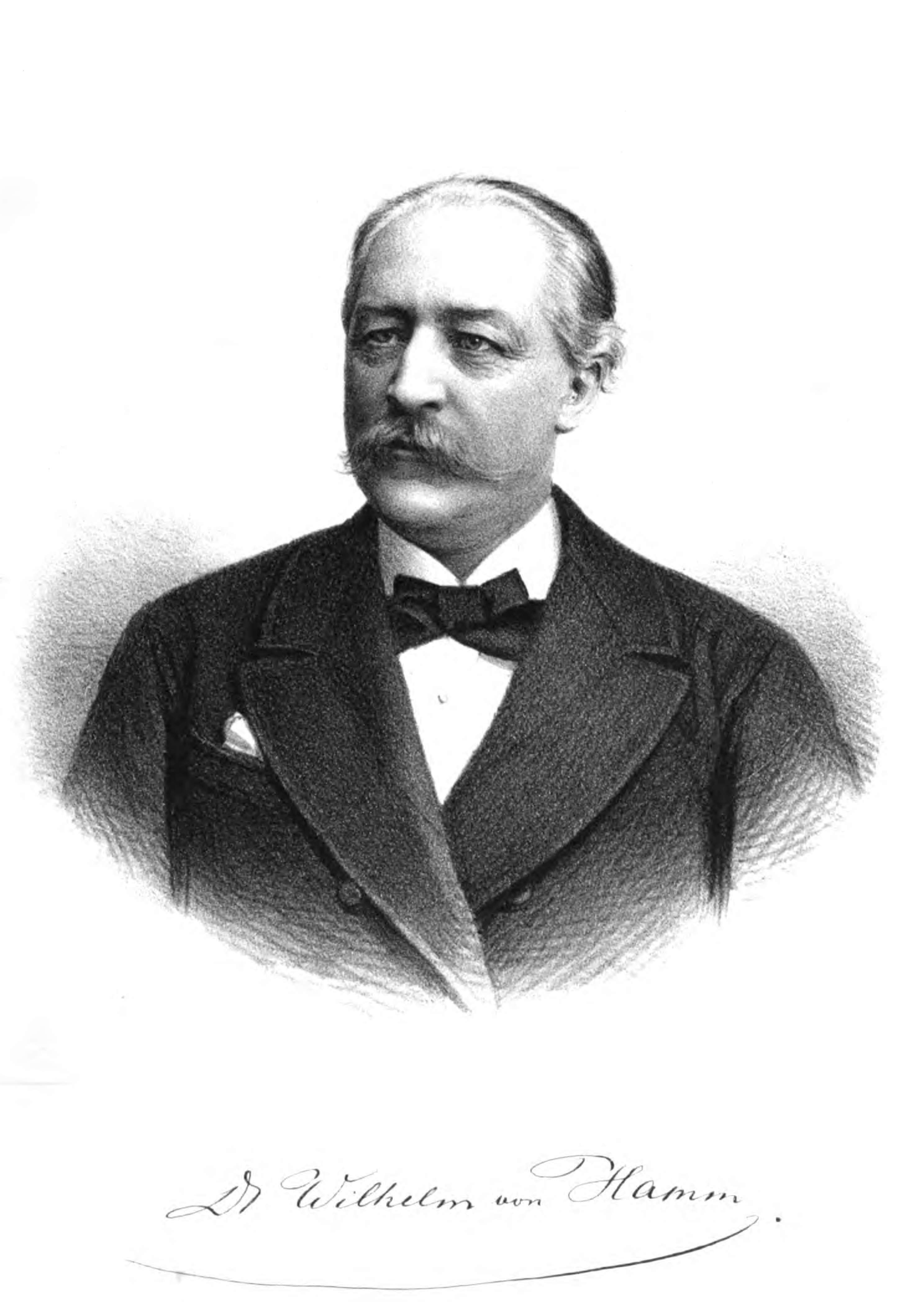 Portrait: Wilhelm von Hamm. In: Gesammelte kleine Schriften von Dr. Wilhelm Ritter von Hamm. Nach dessen Tode herausgegeben von Dr. Leo Pribyl. A. Hartleben’s Verlag, Wien. Pest. Leipzig 1881